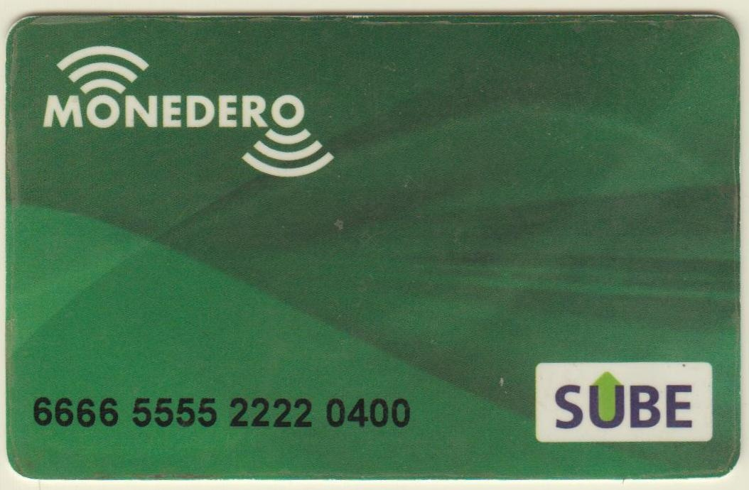 Tarjeta Monedero - SUBE